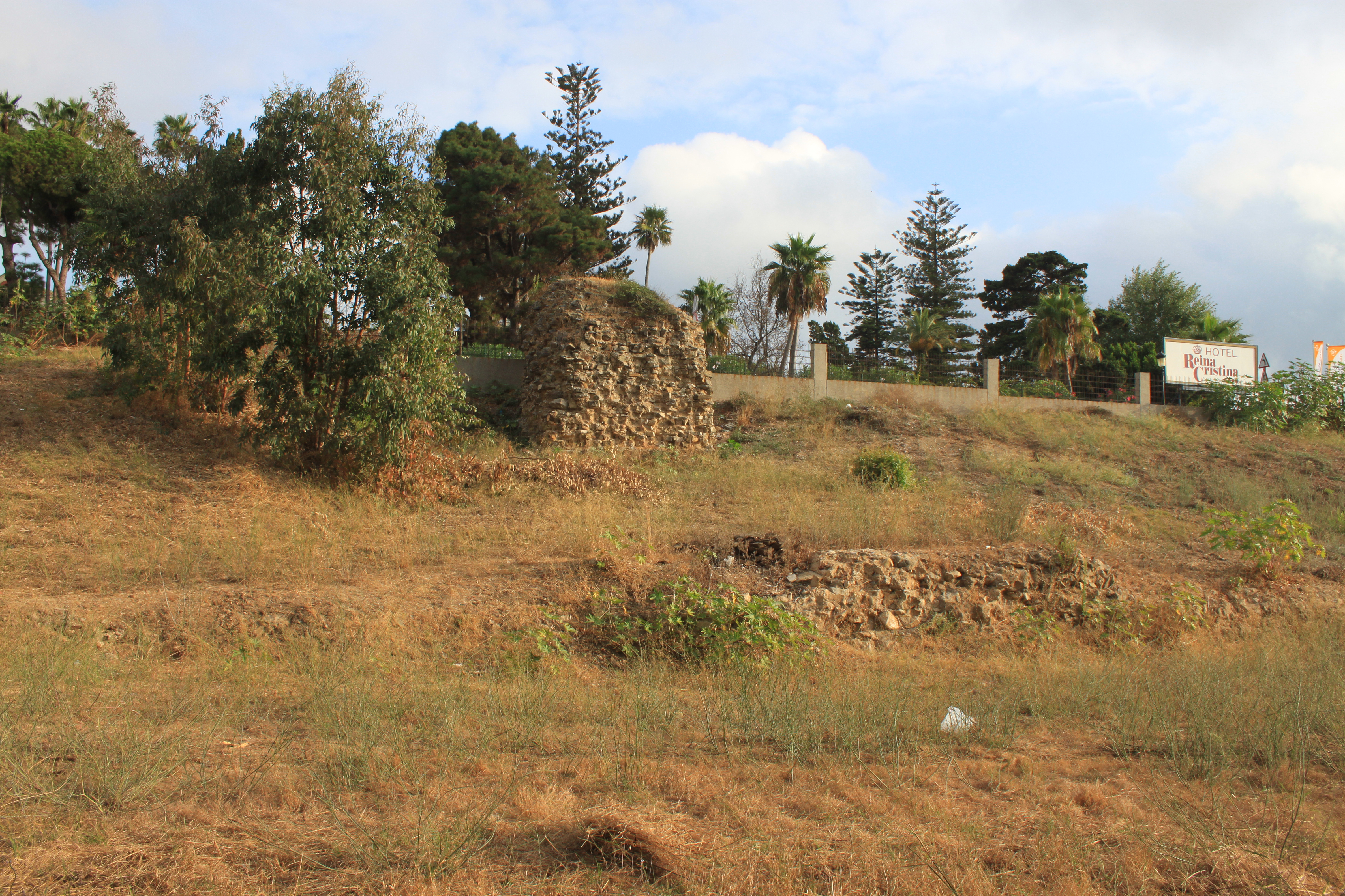 Huerta en Carmen de la localidad andaluza de Algeciras. Torre 3 del yacimiento y restos de la primera barbacana.